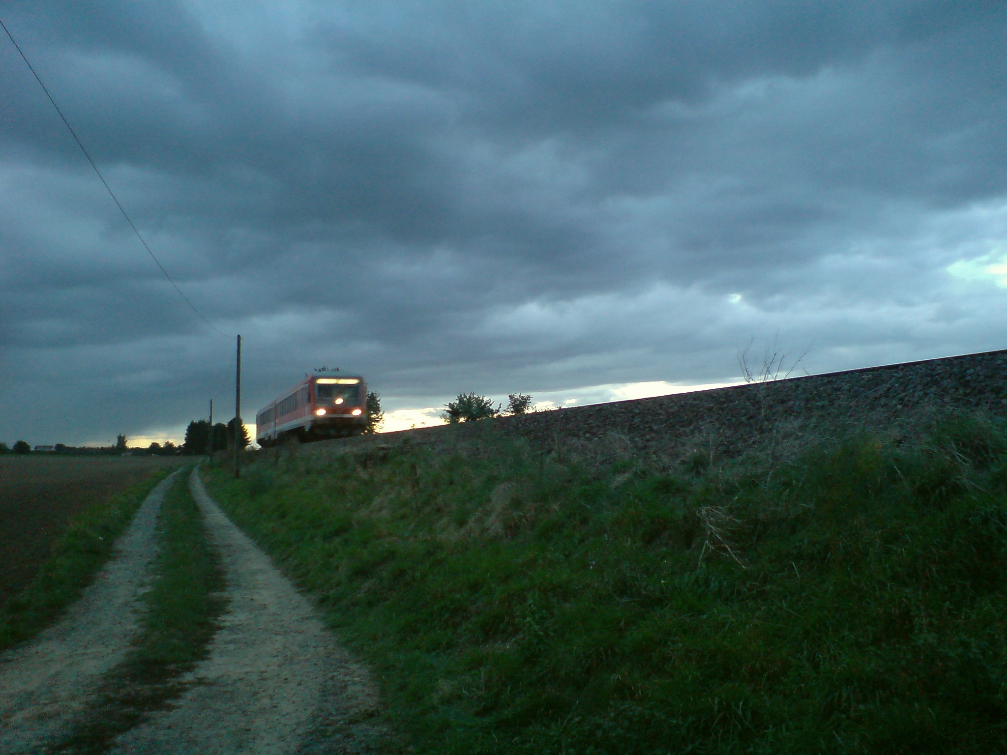 BR 628 vor Monsheim